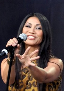 Anggun au concert pour l'égalité de SOS racisme